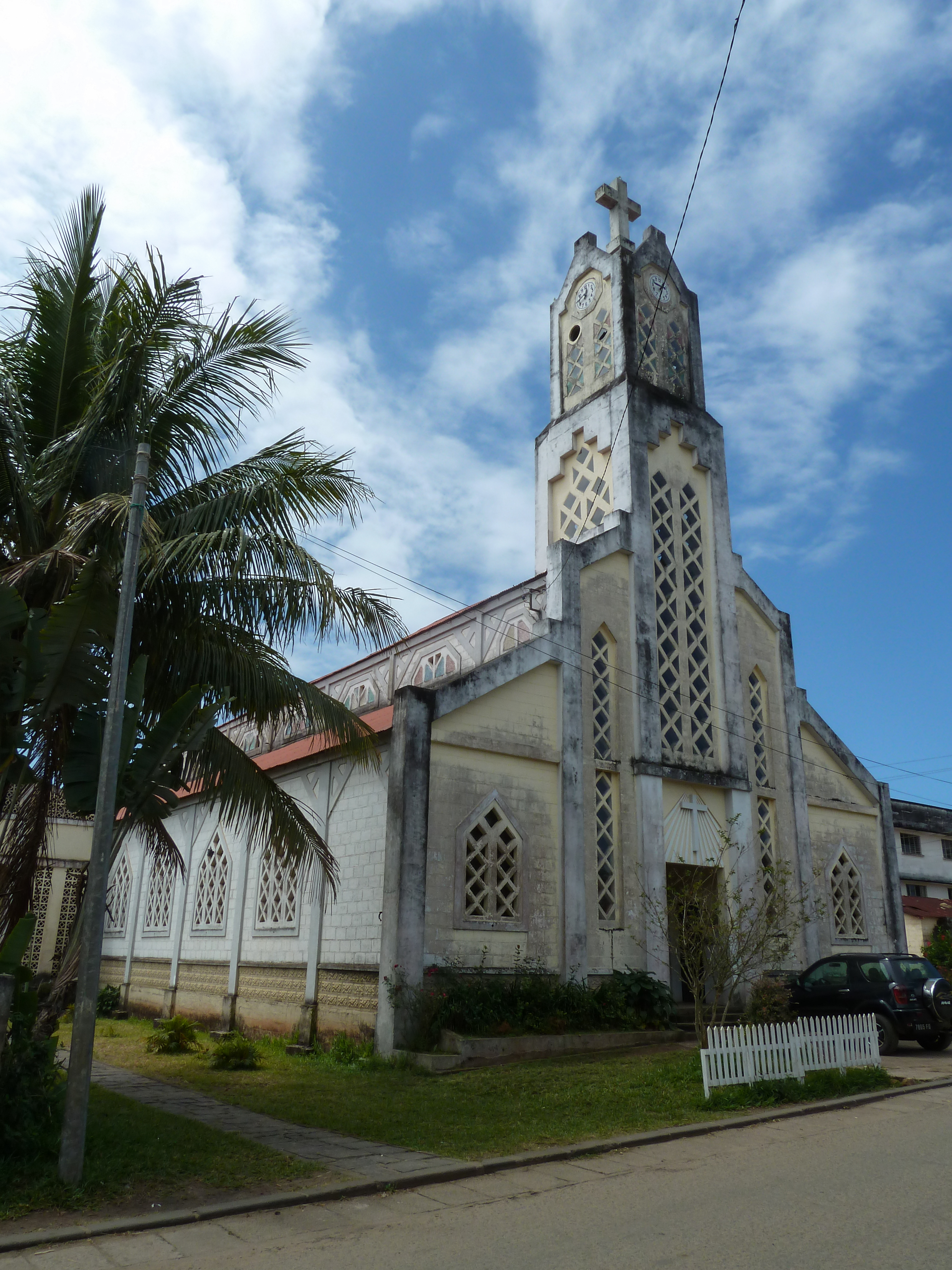 Katholieke kerk van Mananjary